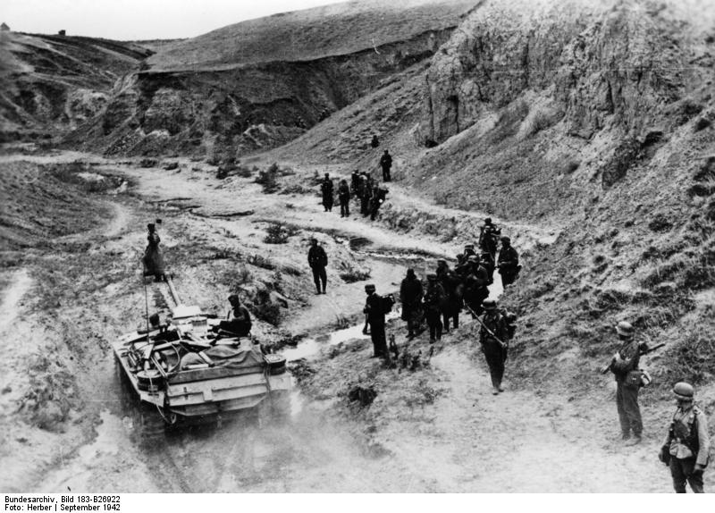 Russland, Kampf um Stalingrad, Infanterie Infanterie vor Stalingrad.- Infanterie und Sturmgeschütze in der Bereitstellung zum Angriff auf die Höhe 102 zwischen dem Stadtzentrum und dem Industrieviertel Barikady. PK-Aufnahme: Kriegsberichter Herber (Sch) o. NR. "Fr"f.D Sept. 42 "Fr" OKW [Sowjetunion.- Schlacht um Stalingrad]